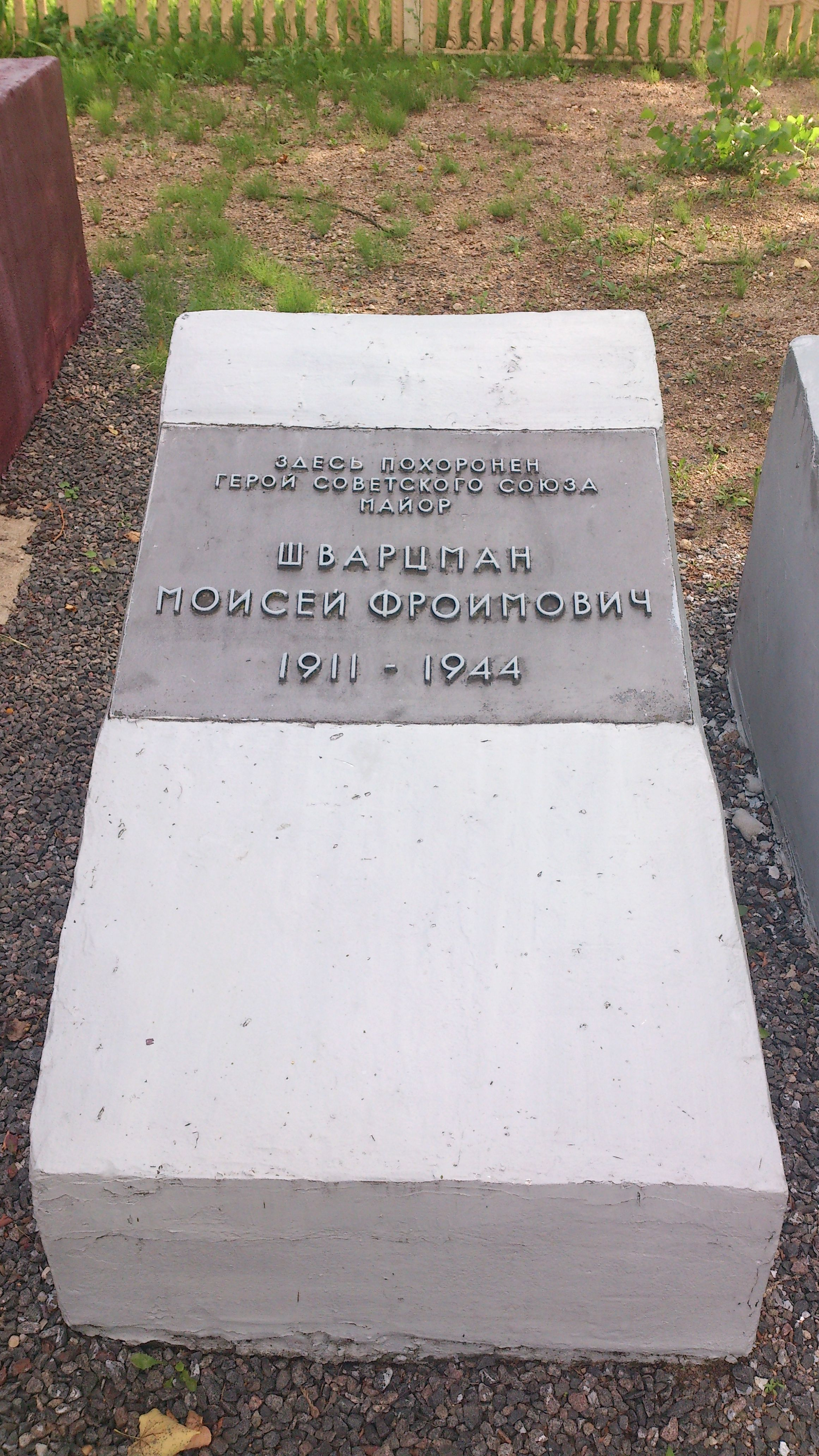 Надмогильная плита Герою Советского Союза Шварцману М.Ф. на братской могиле в Бешенковичах